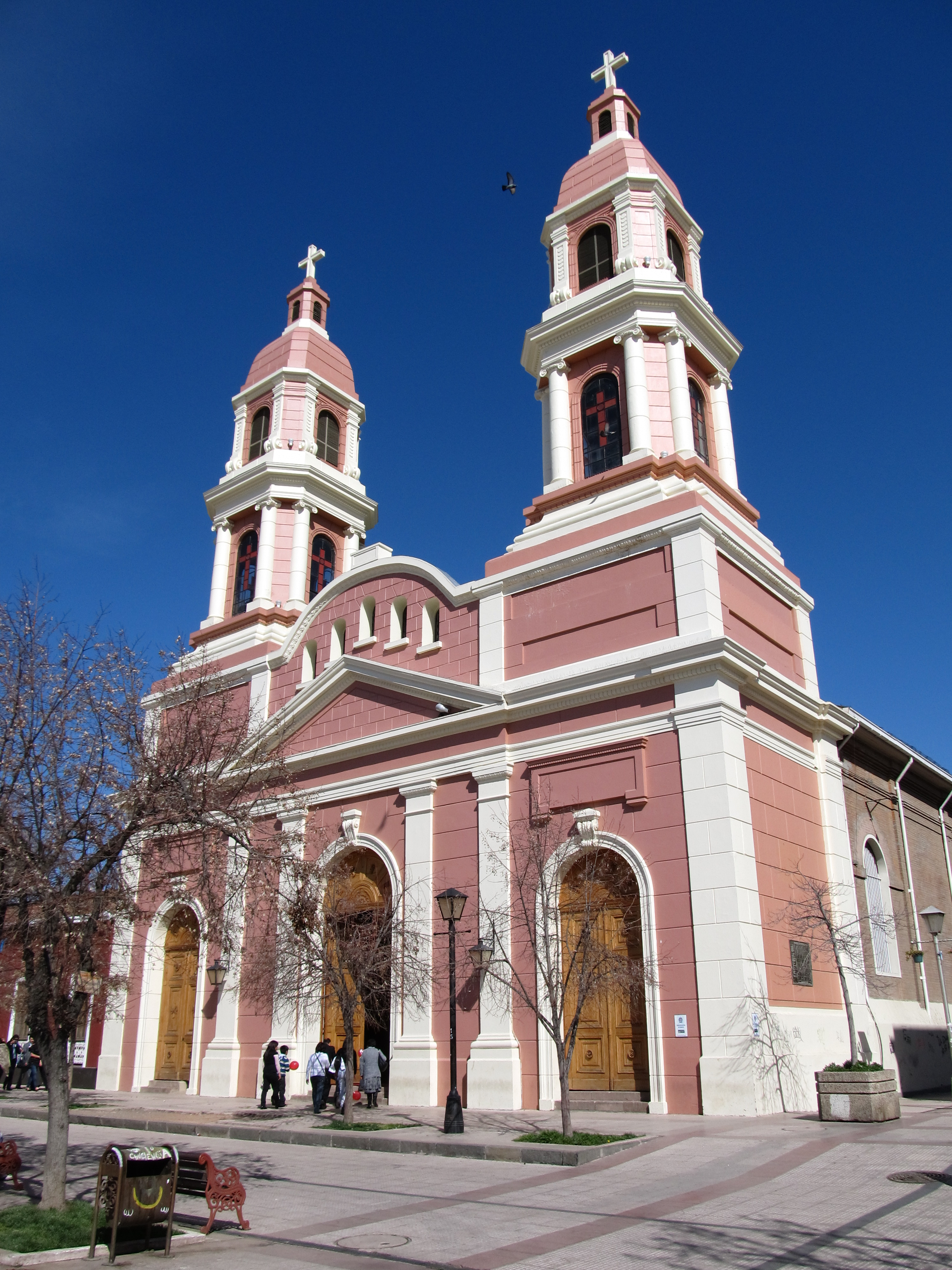 Catedral de Rancagua, Chile.